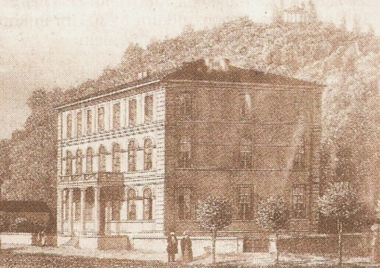 Wohnhaus ("Westendhaus") des Arztes Heinrich Carl Welsch (1807-1882), heute Bismarckstraße 26